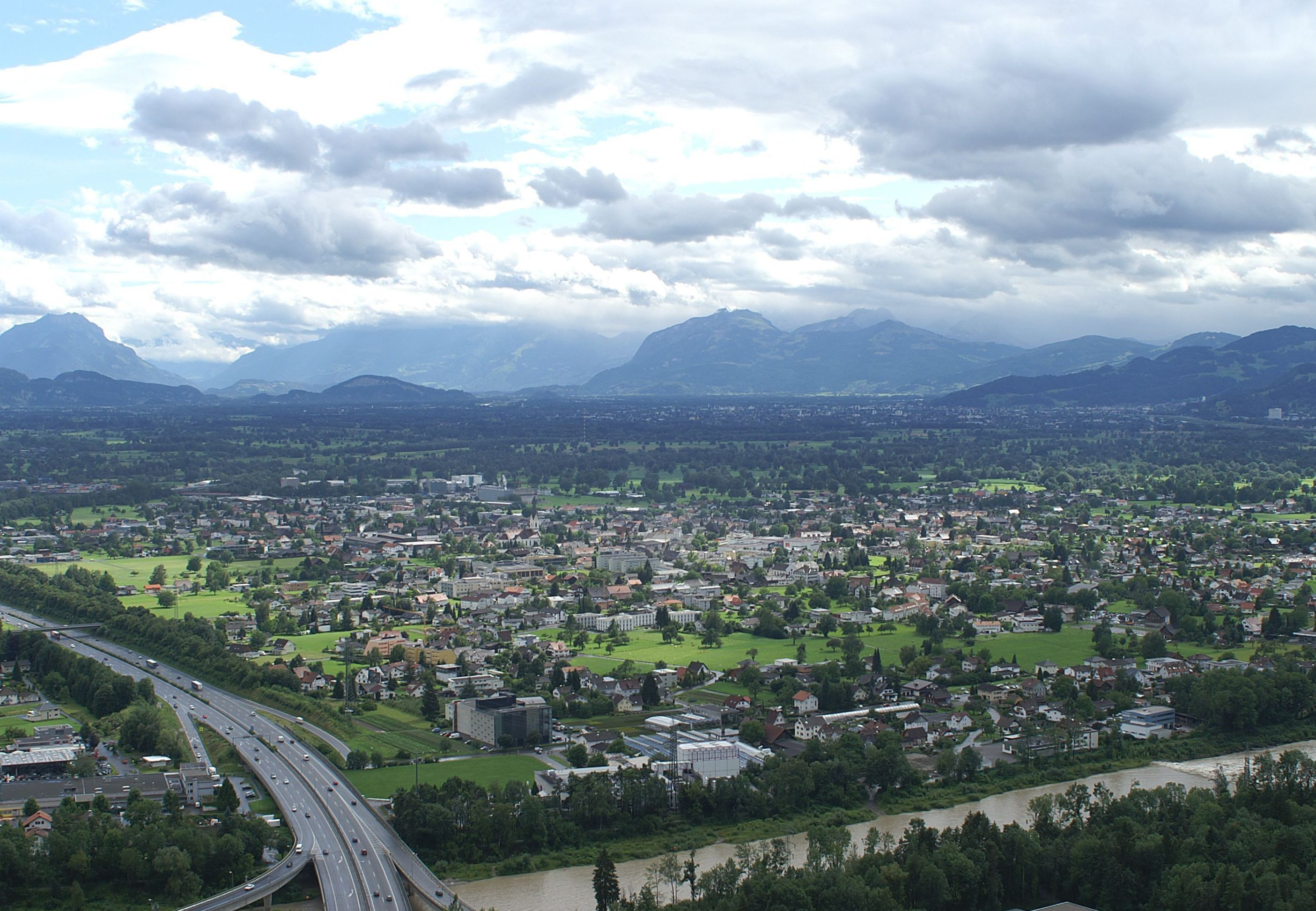 Gemeinde Lauterach mit Blick auf die Schweizer Berge. Im Vordergrund die A14 Rheintalautobahn sowie die Bregenzerache.